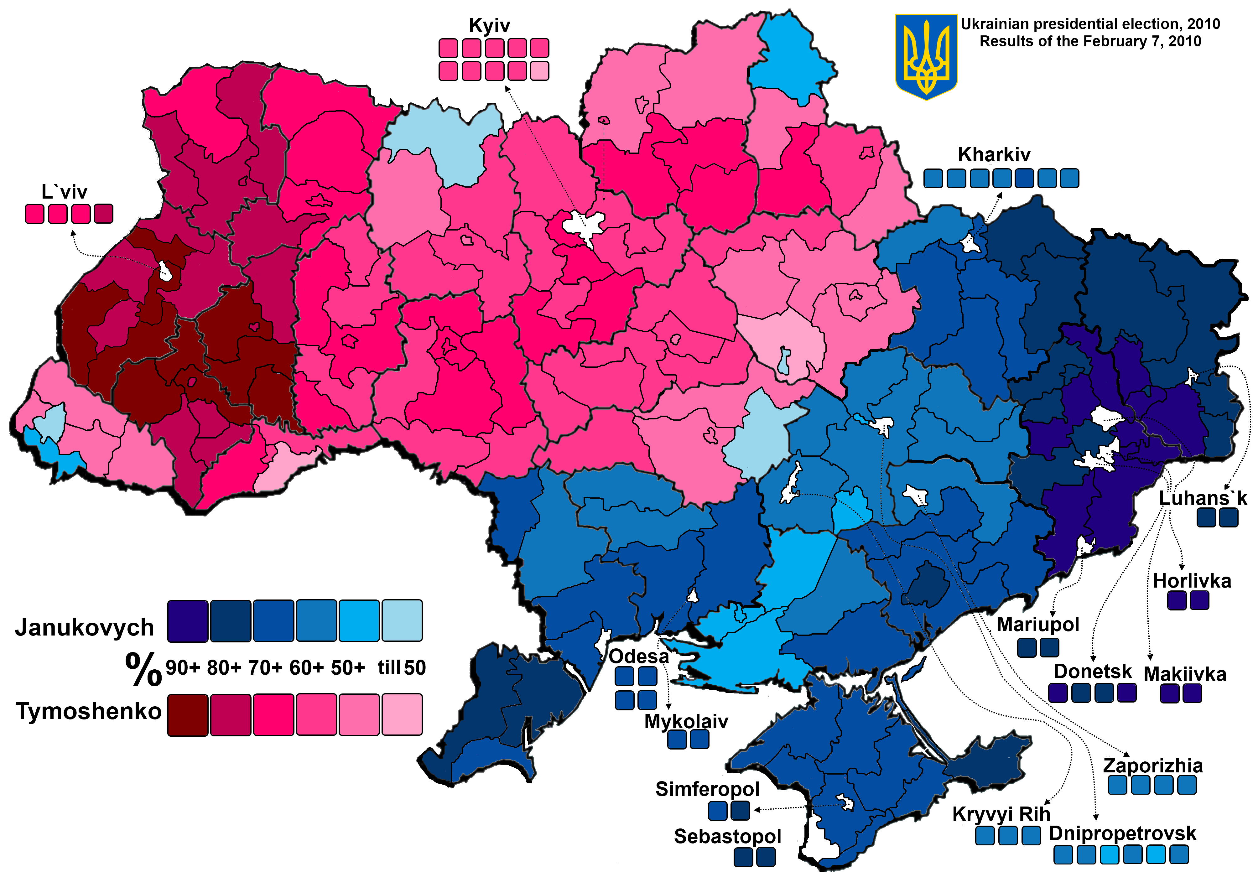 Переможці по округам. Другий тур. Англійською